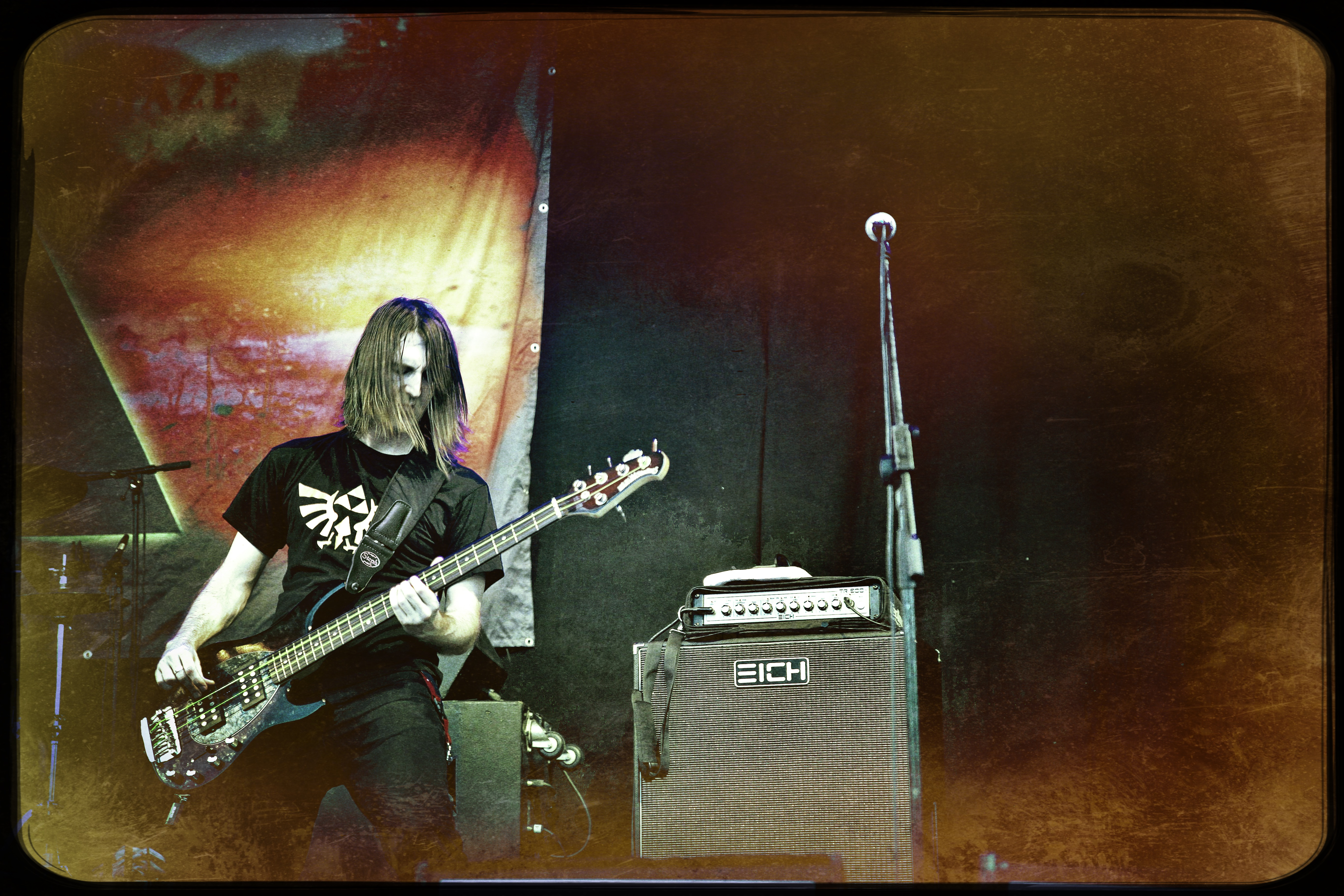 Robert 'Hubi' Hofmann 2018 am JUKUU Festival